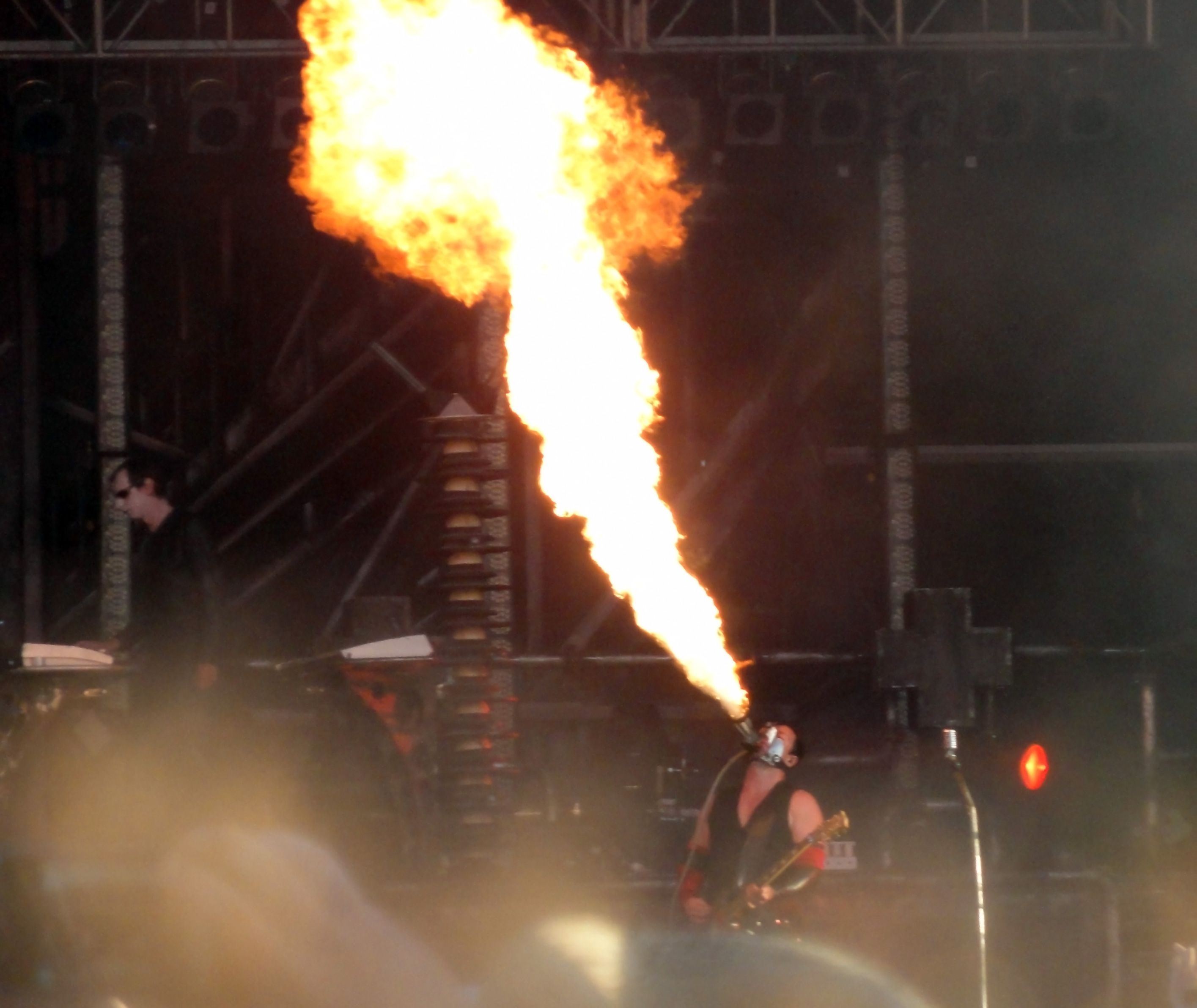 Rammstein